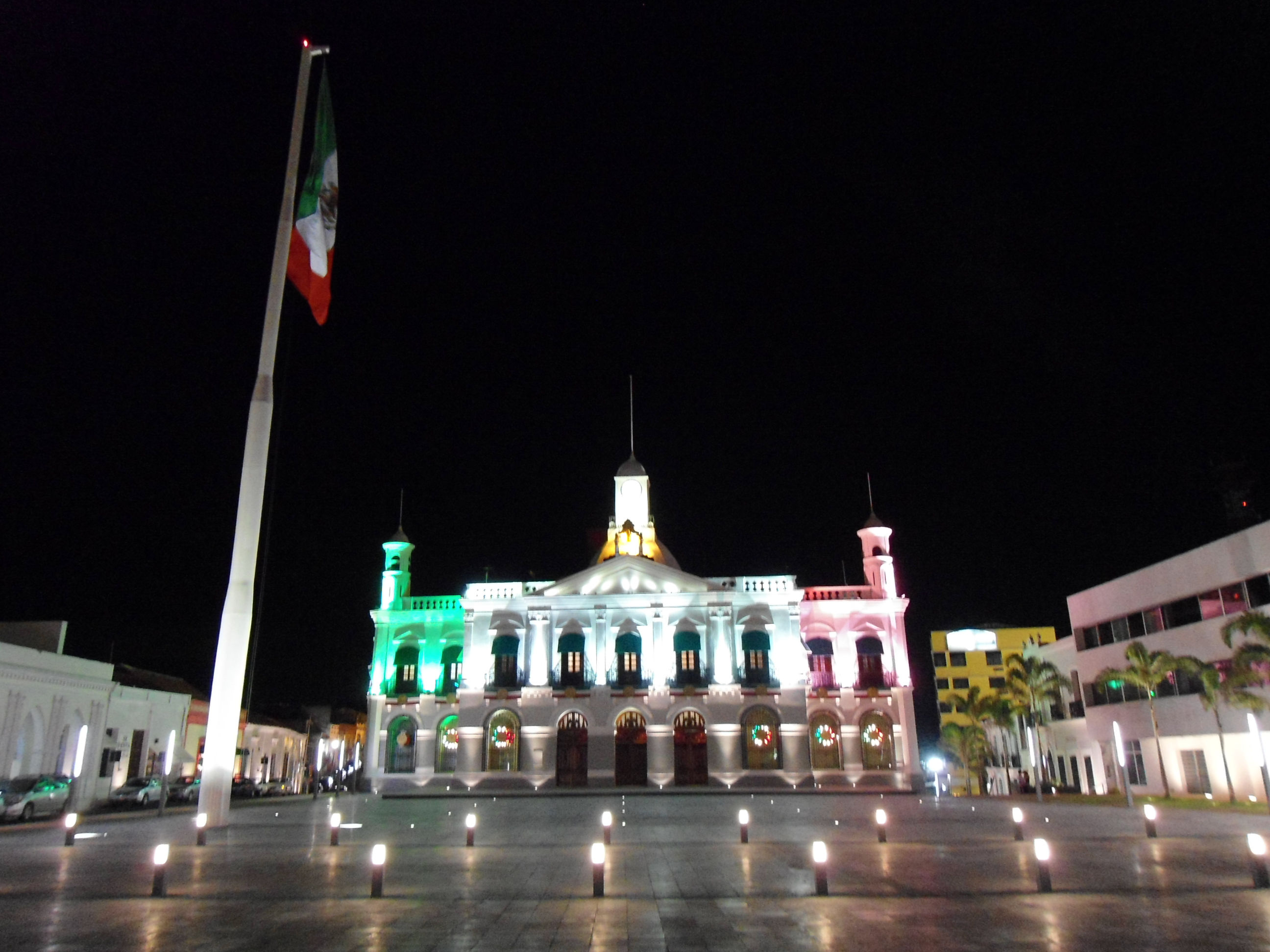 Palacio de Gobierno de Tabasco duranrte las celebraciones por la Independencia Nacional. Plaza de Armas, Villahermosa, Tabasco, México.